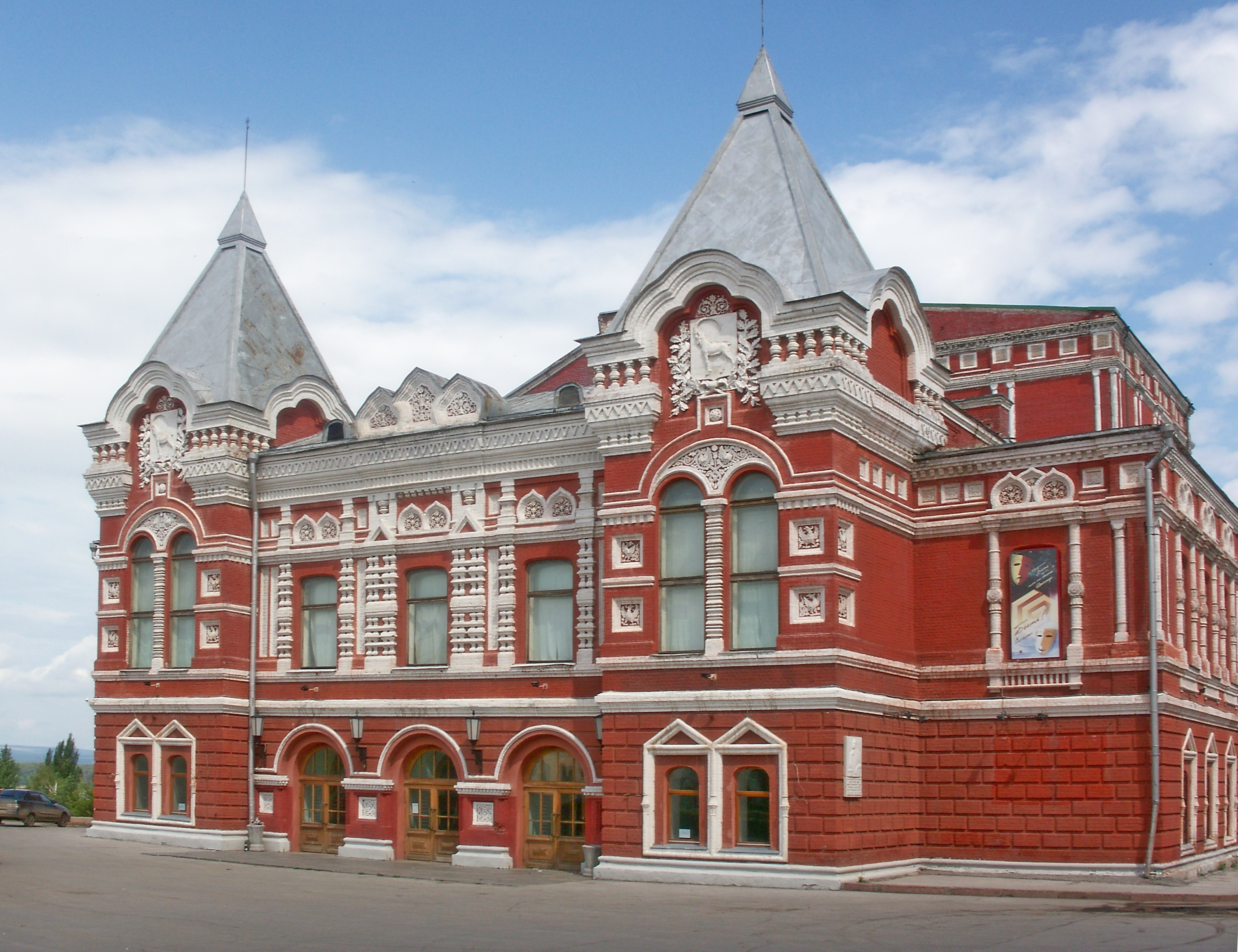 Samarské divadlo jména M. Gorkého